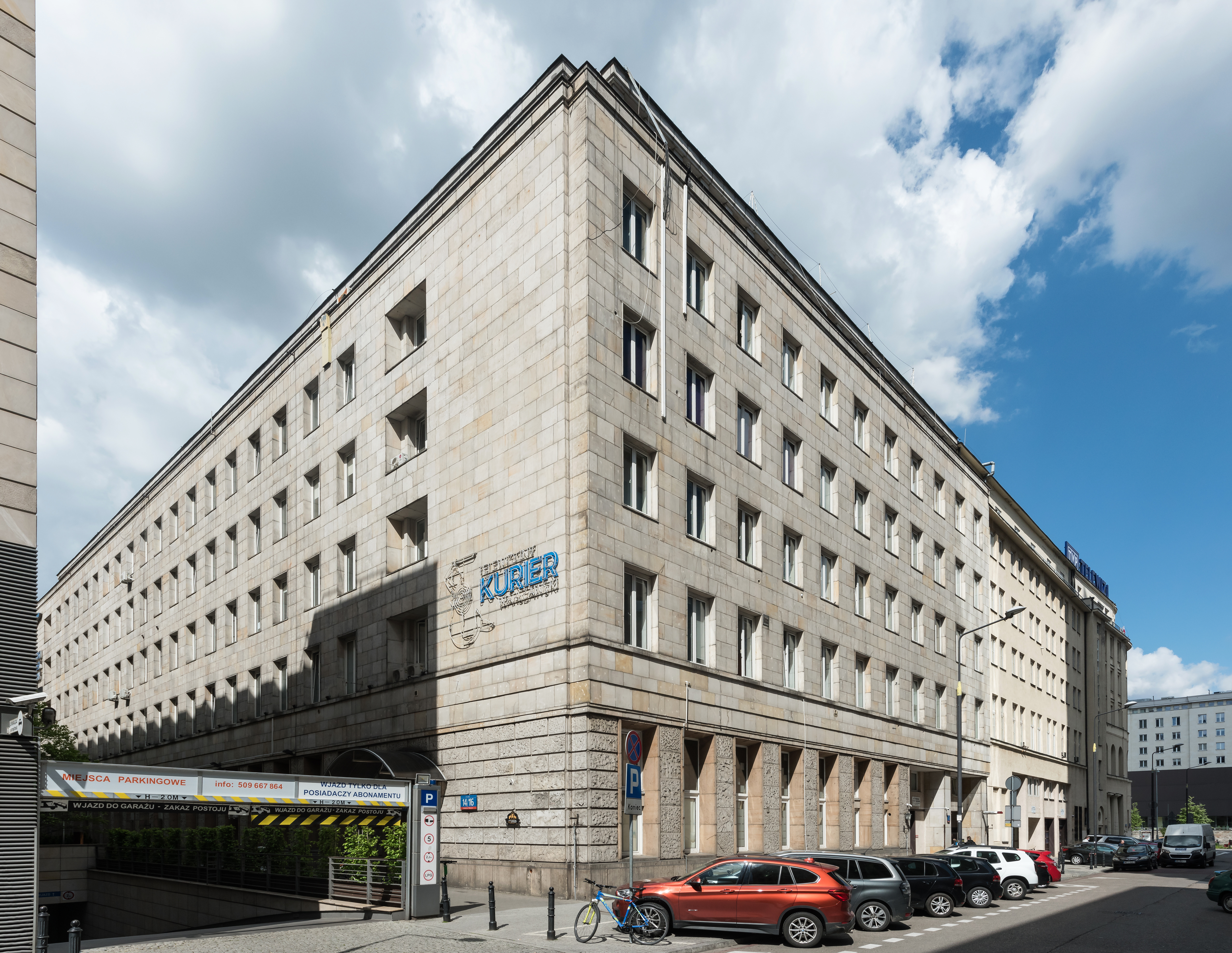 Siedziba TVP3 Warszawa przy ul. Jasnej 14/16, widok od strony ul. Sienkiewicza